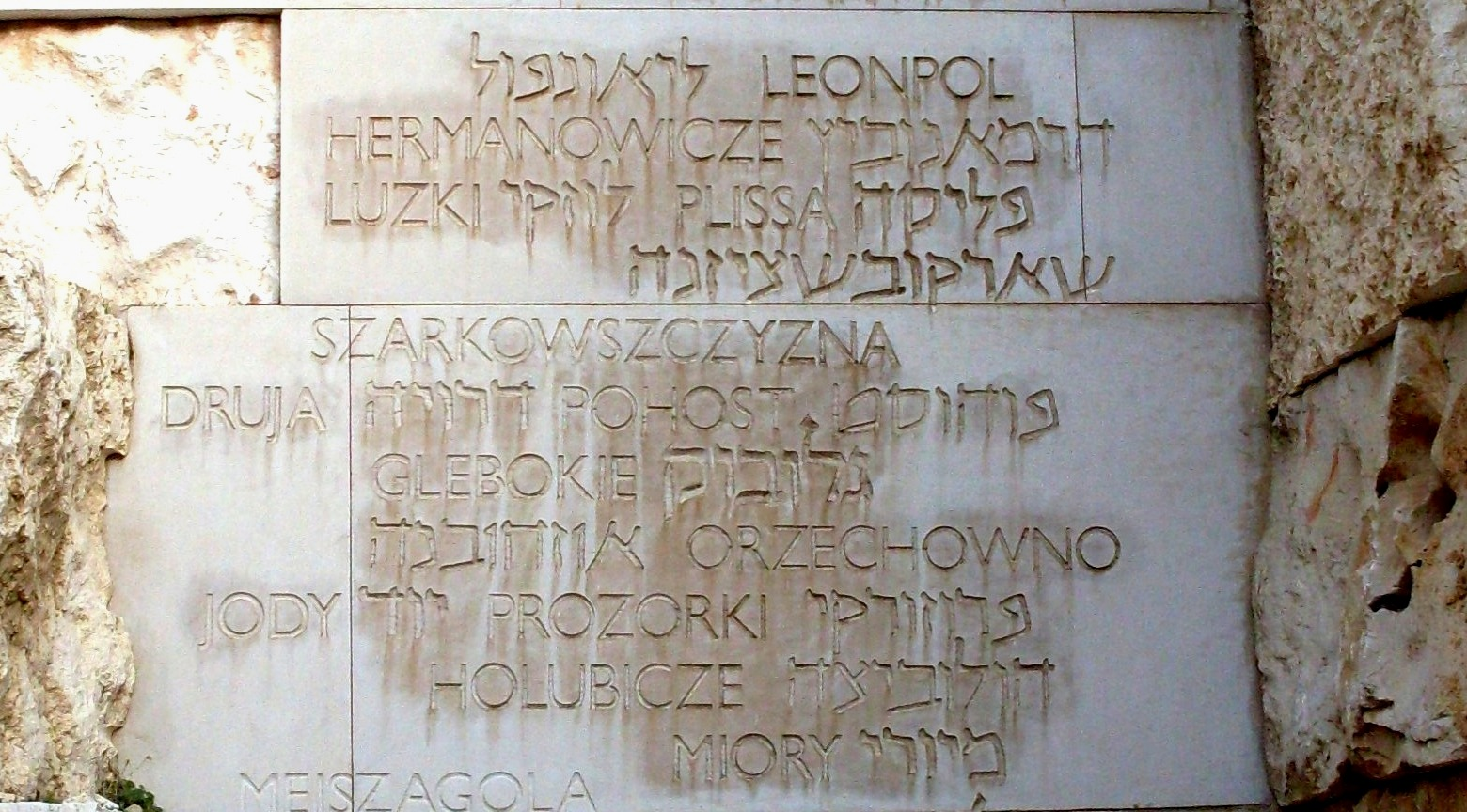 Белорусская часть "Долины разрушенных общин" в Яд Вашем с с названиями еврейских общин на территории послевоенной Беларуси, частично или полностью уничтоженных во время Холокоста.